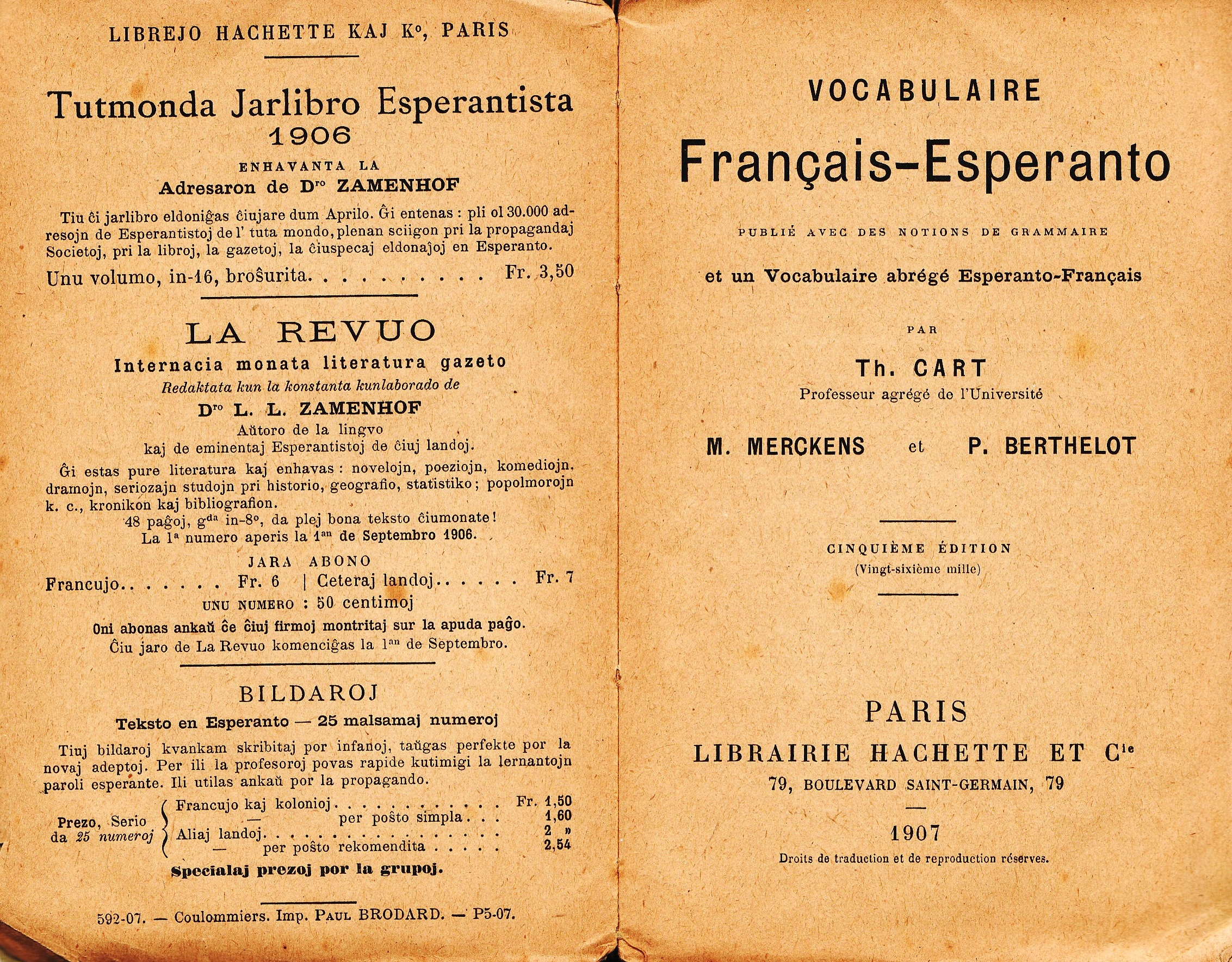 Vocabulaire Français-Esperanto